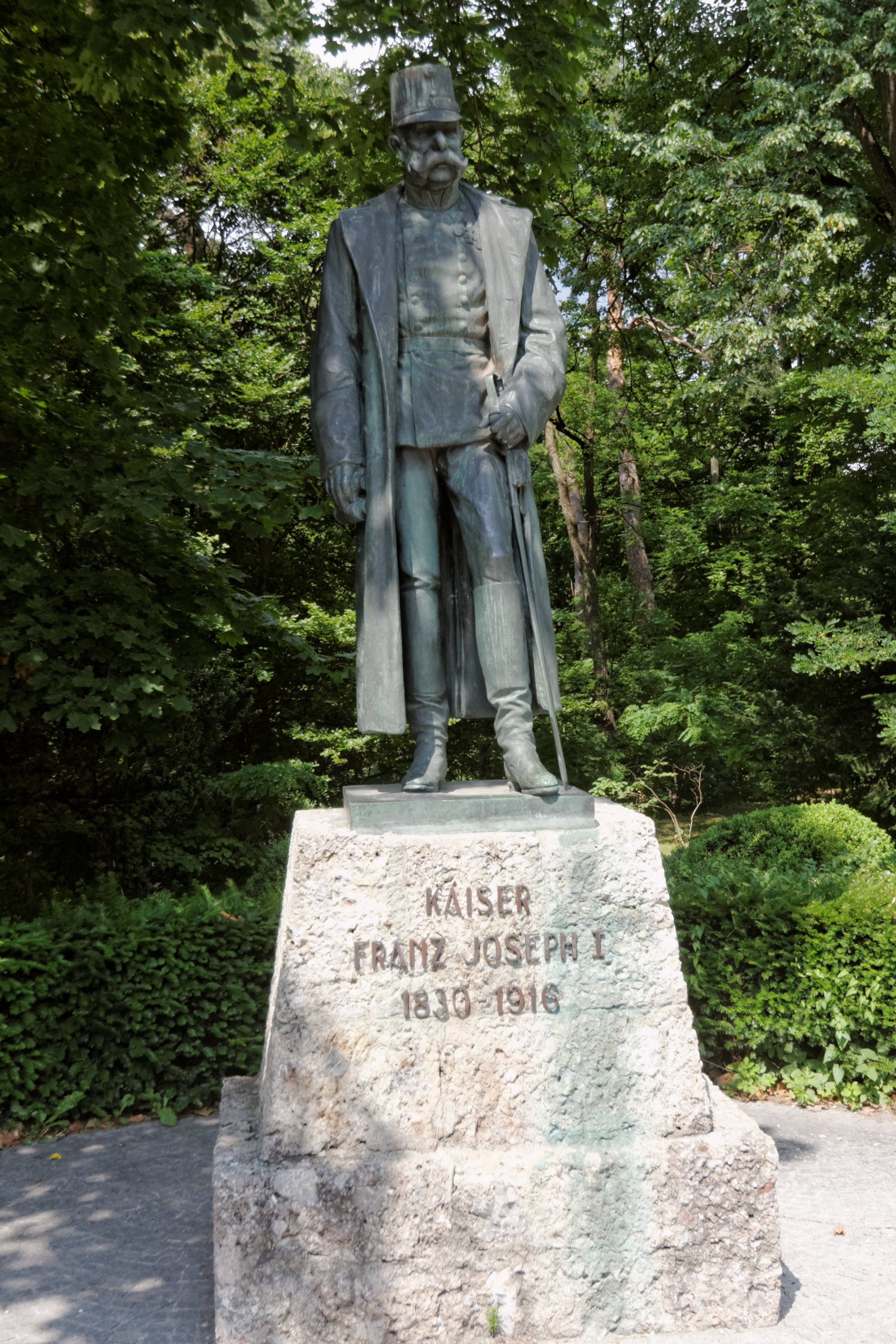 Kaiser Franz Josef Denkmal, Berg Isel, Innsbruck